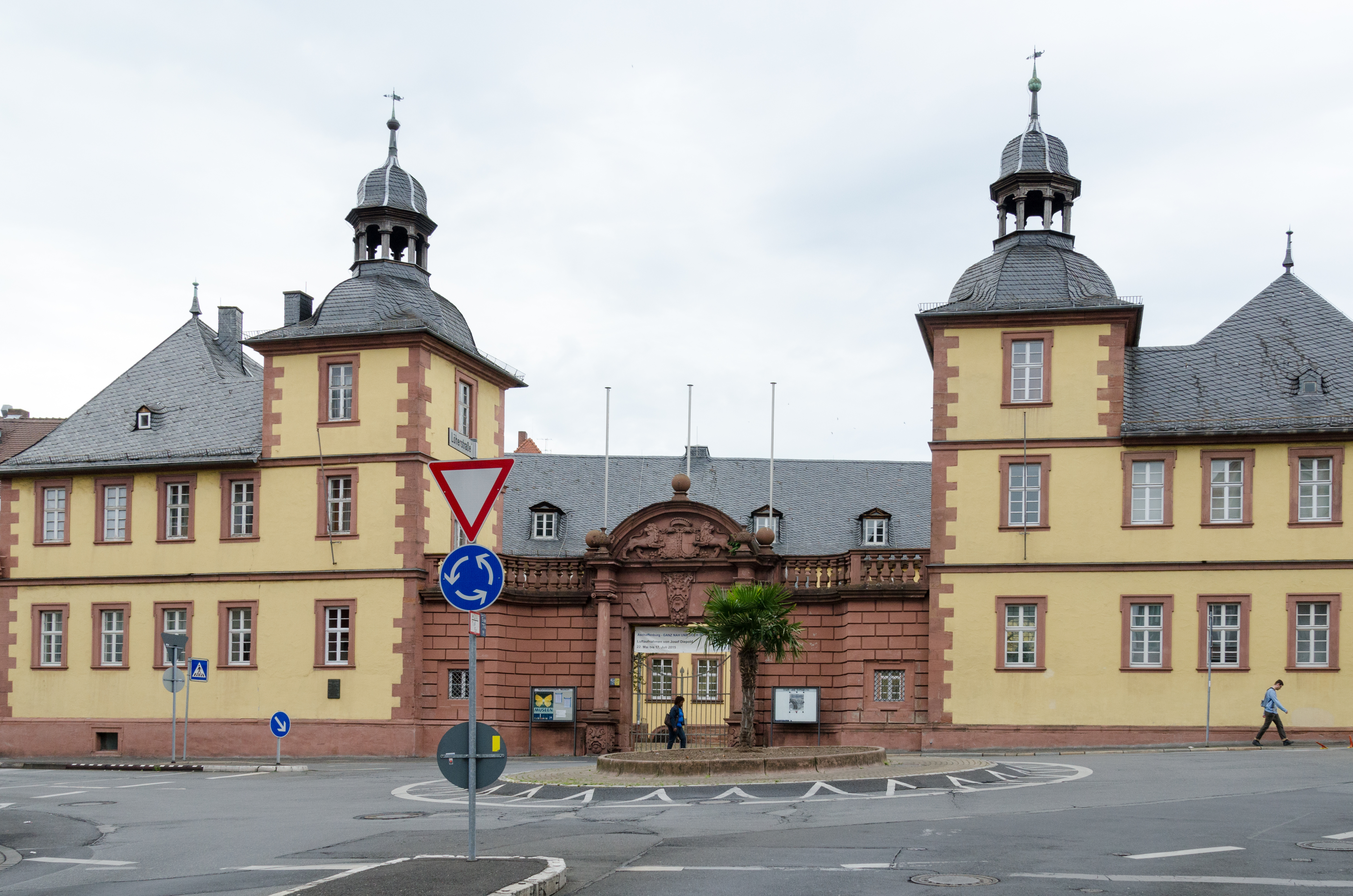 Aschaffenburg, Wermbachstraße 15